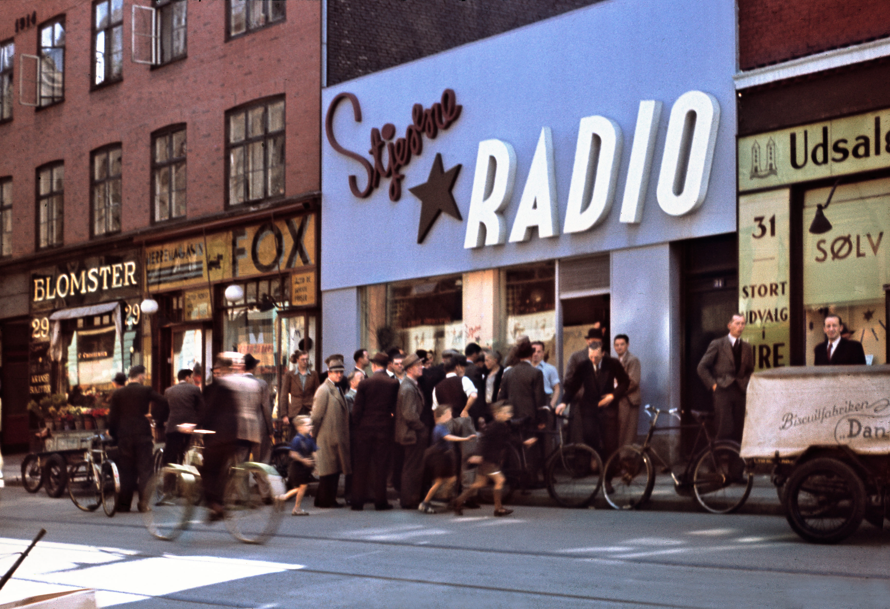 Stjerne Radio ved Istedgade 31.